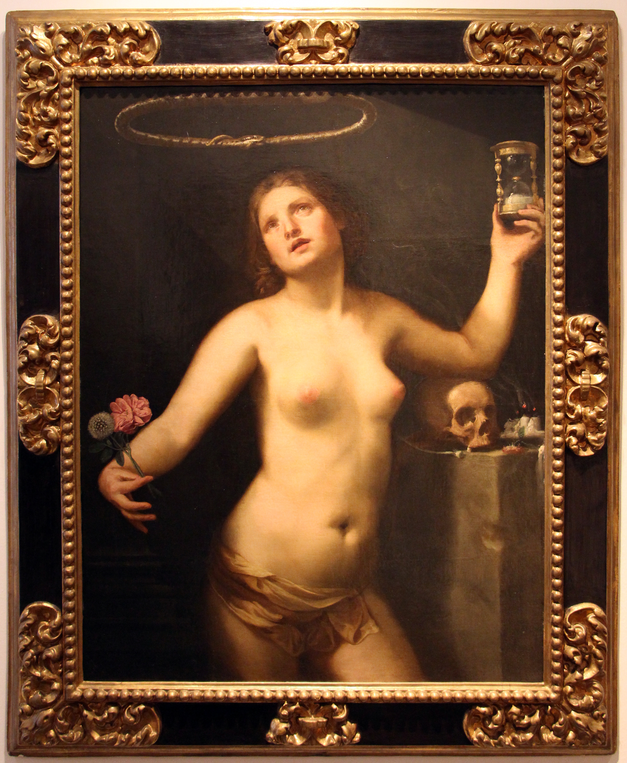 allegoria del tempo (la vita umana)title QS:P1476,it:"allegoria del tempo (la vita umana)" label QS:Lit,"allegoria del tempo (la vita umana)"